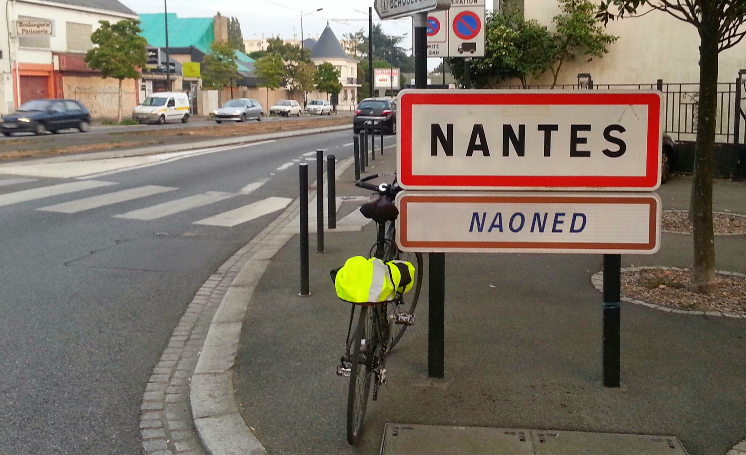 Km203: retour à Nantes!